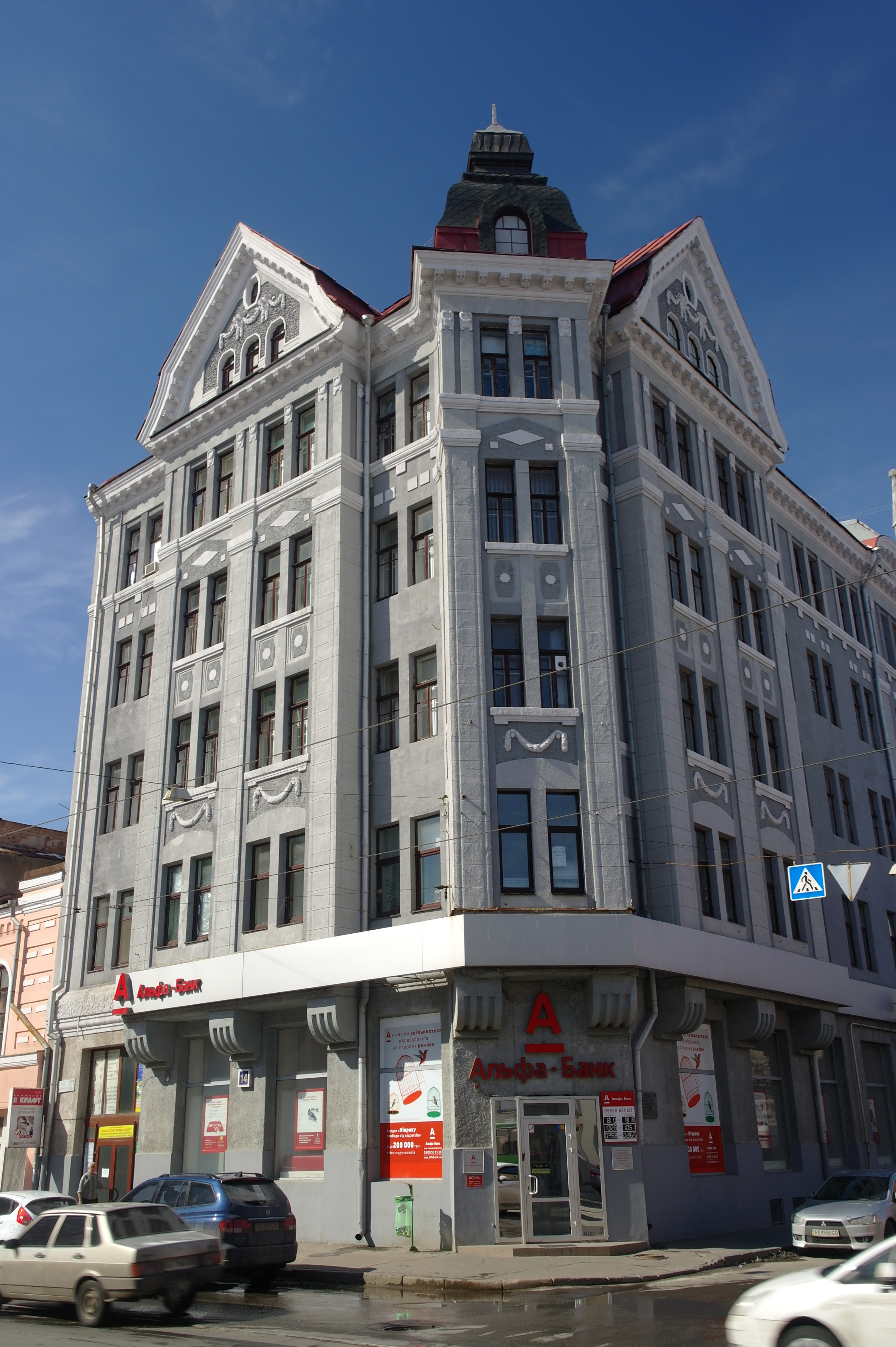 Харків, вул.Різдвяна, 7/вул.Полтавський Шлях, 14. Первісно - готель "Москва"